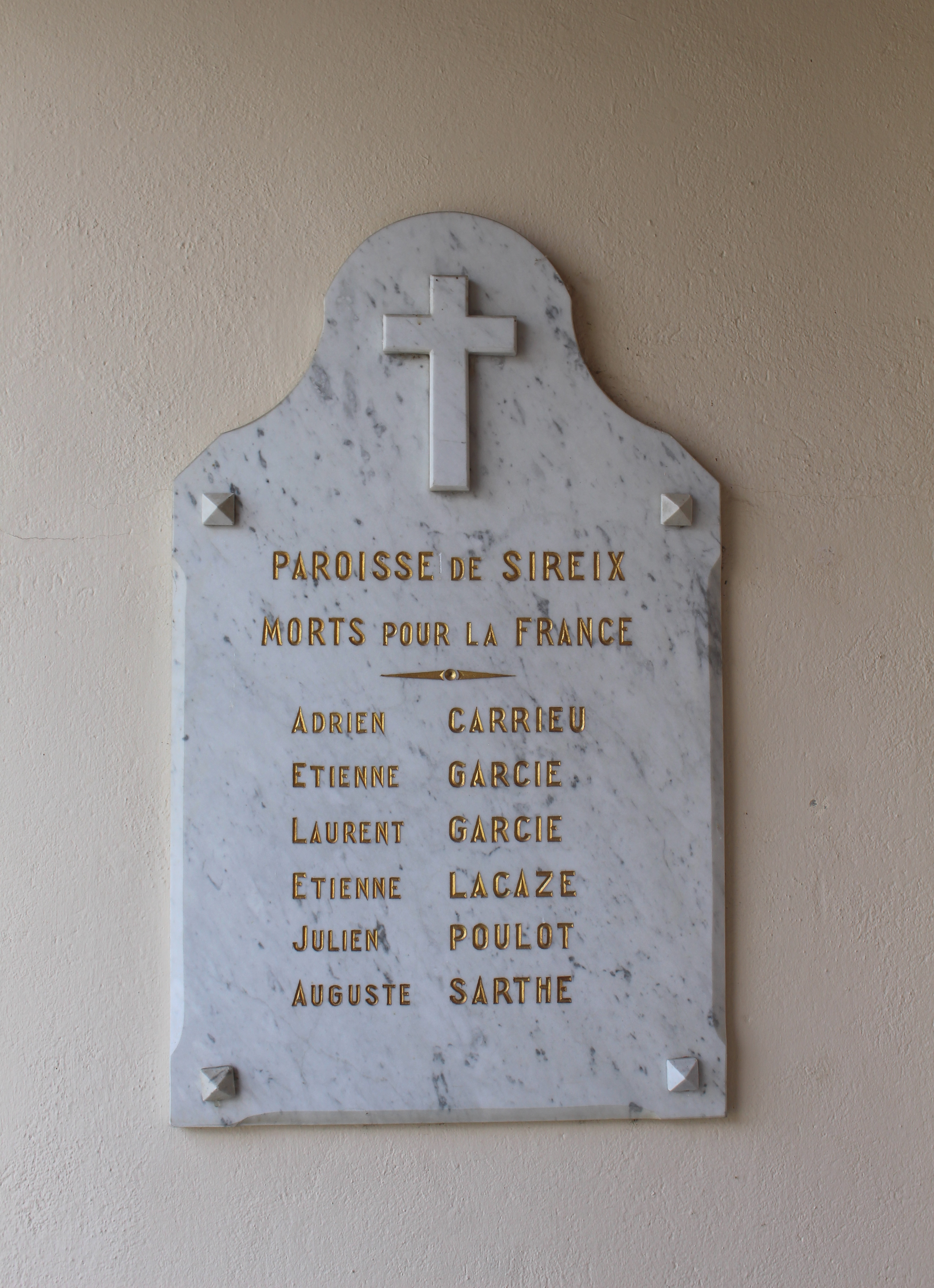 Monument aux morts de Sireix (Hautes-Pyrénées)